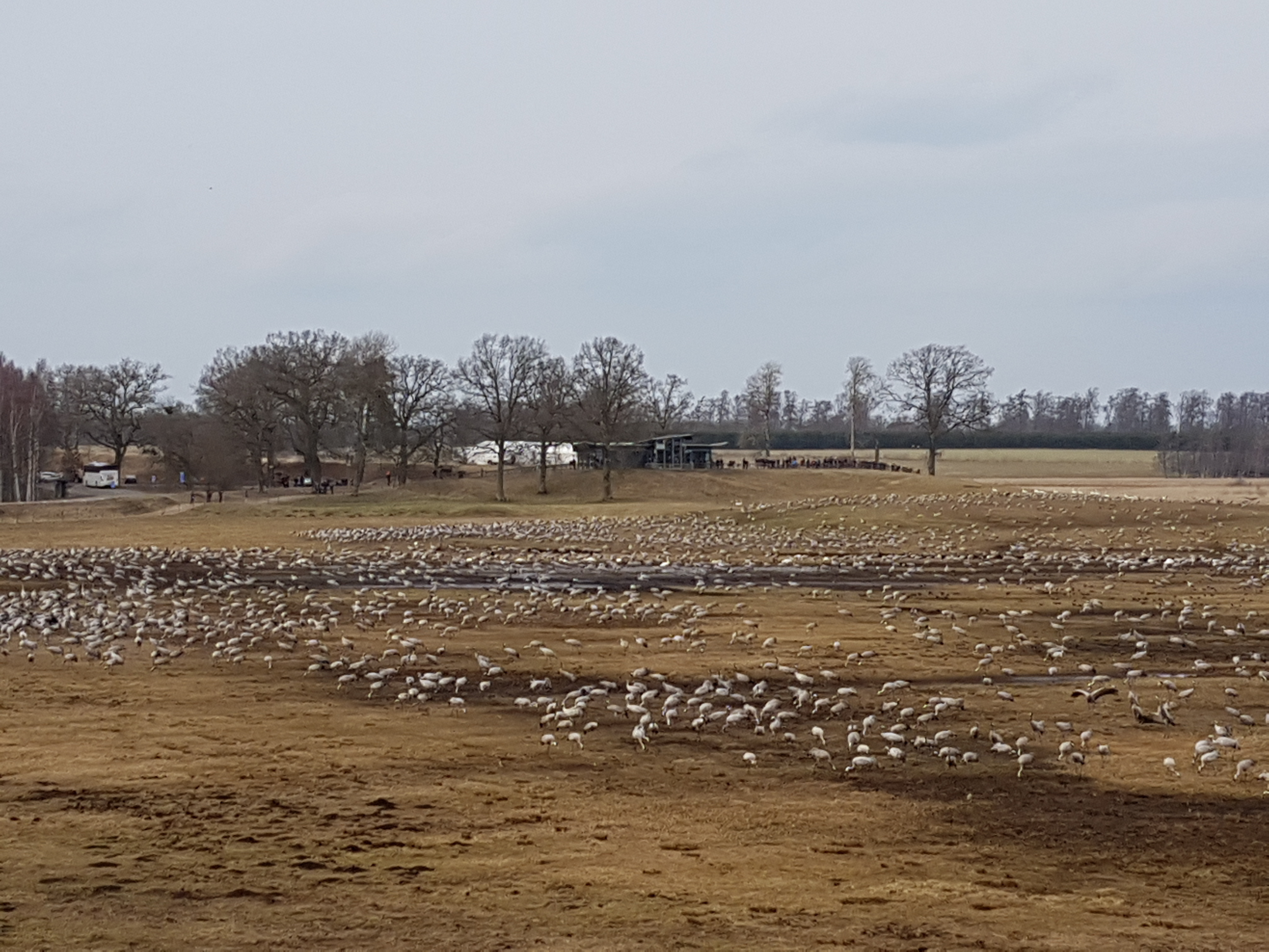 Hornborgasjön 2016